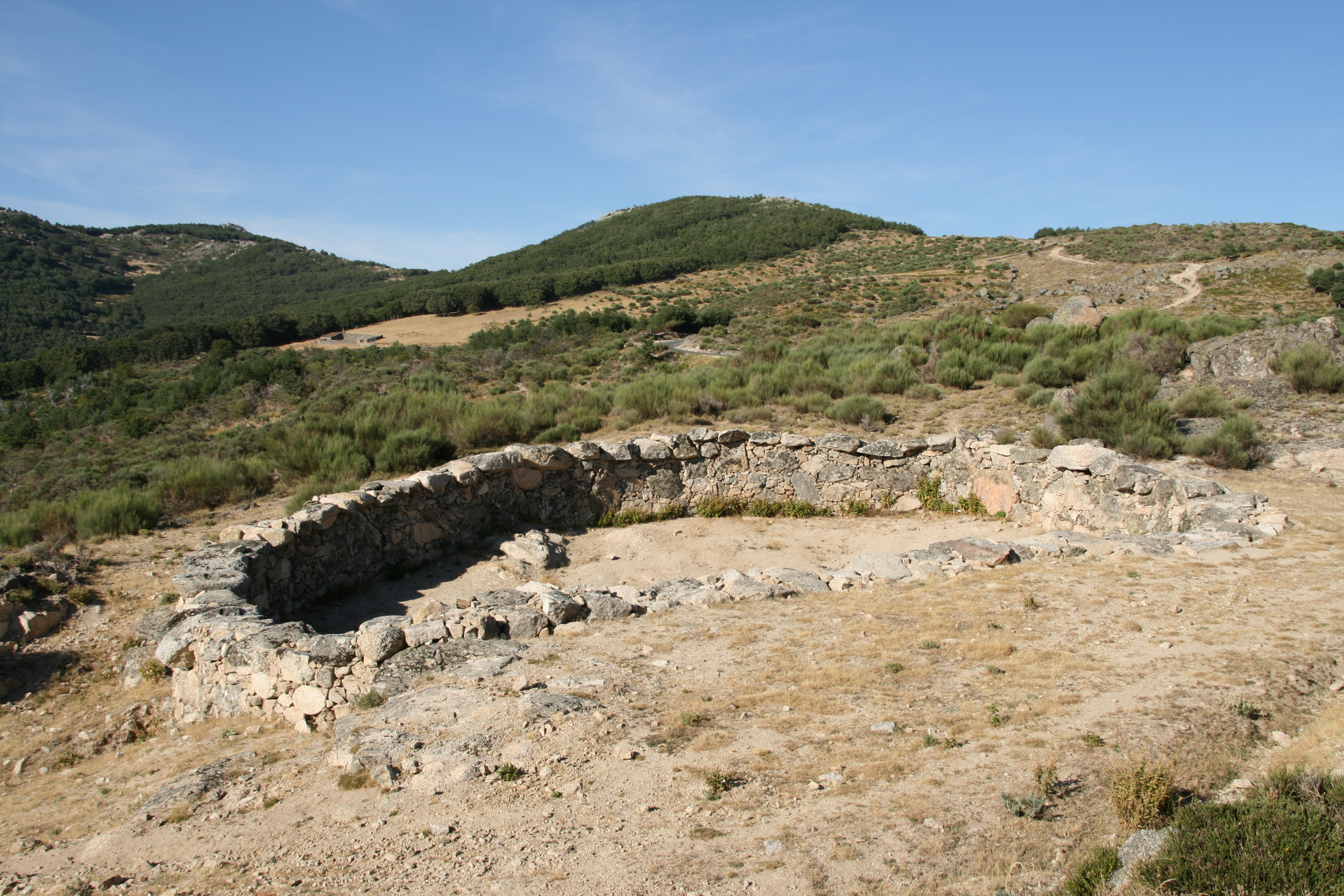 Corral de lobos junto a la carretera de Hervás a Candelario, como a unos dos kilómetros del desvío a La Garganta, en dirección a Candelario